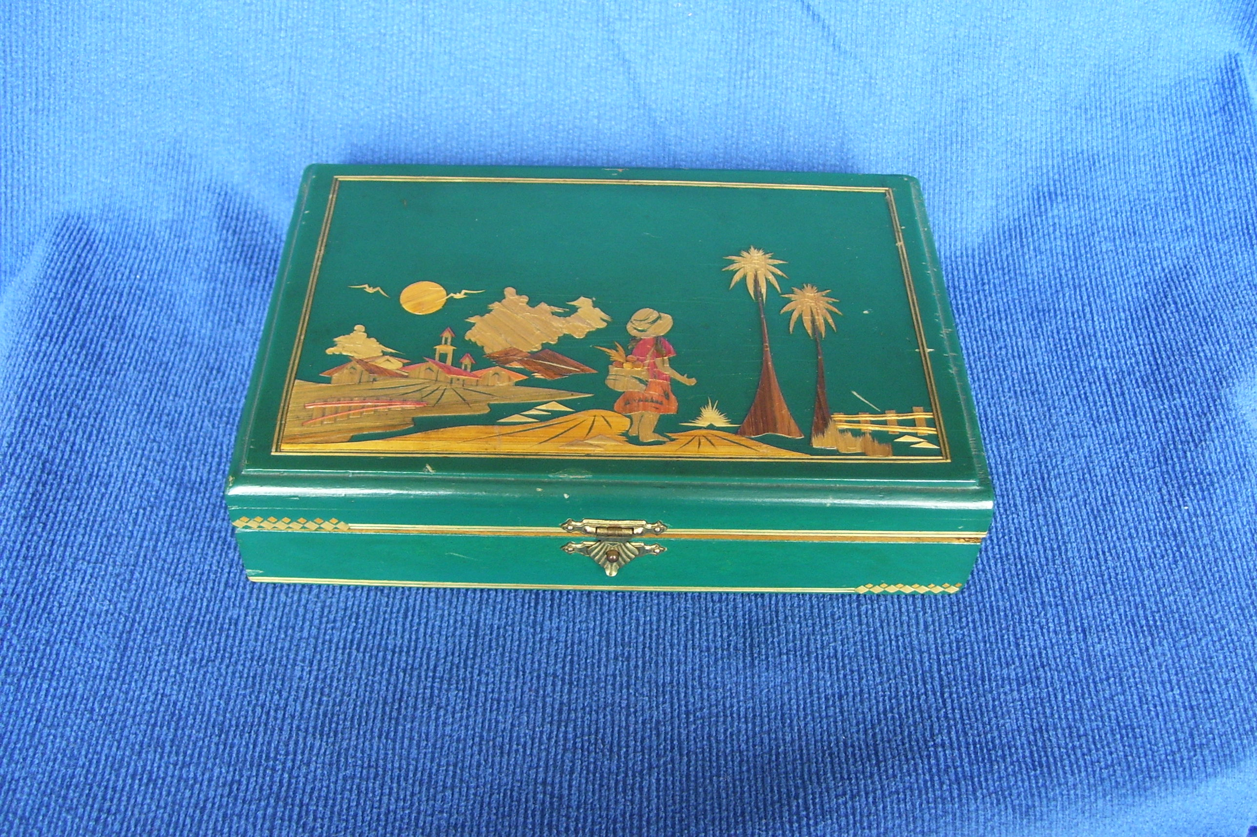 Caja para fichas con decoración en tamo. San juan de pasto, Colombia